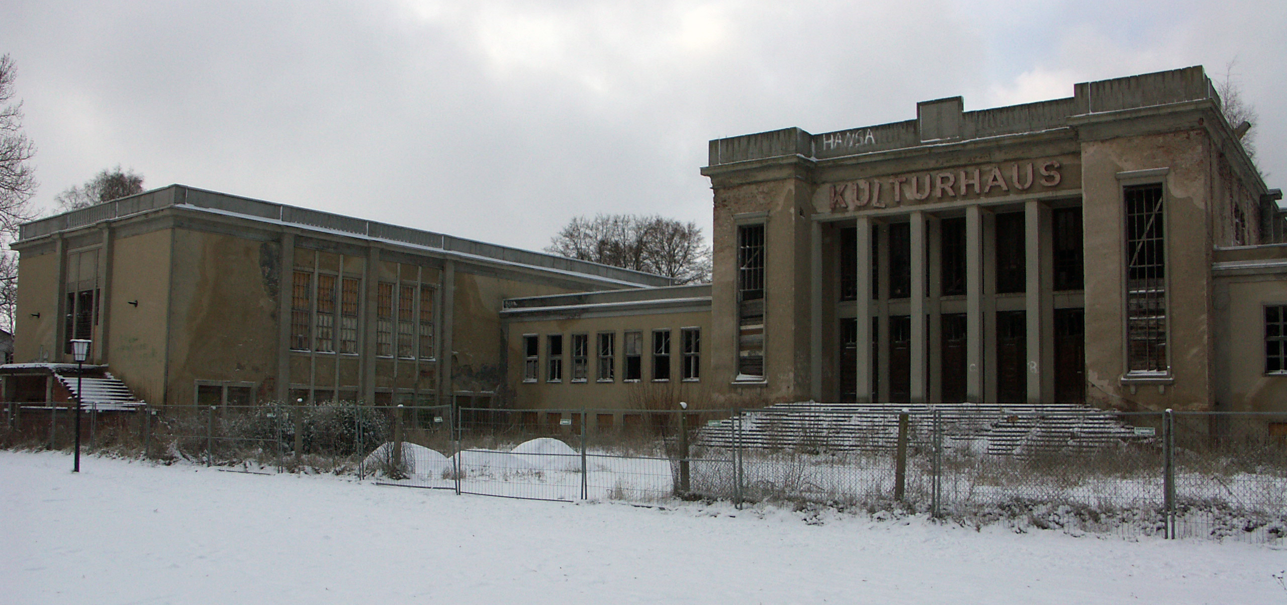 Blick auf das Kulturhaus Zinnowitz mit angrenzenden Funktionsgebäuden